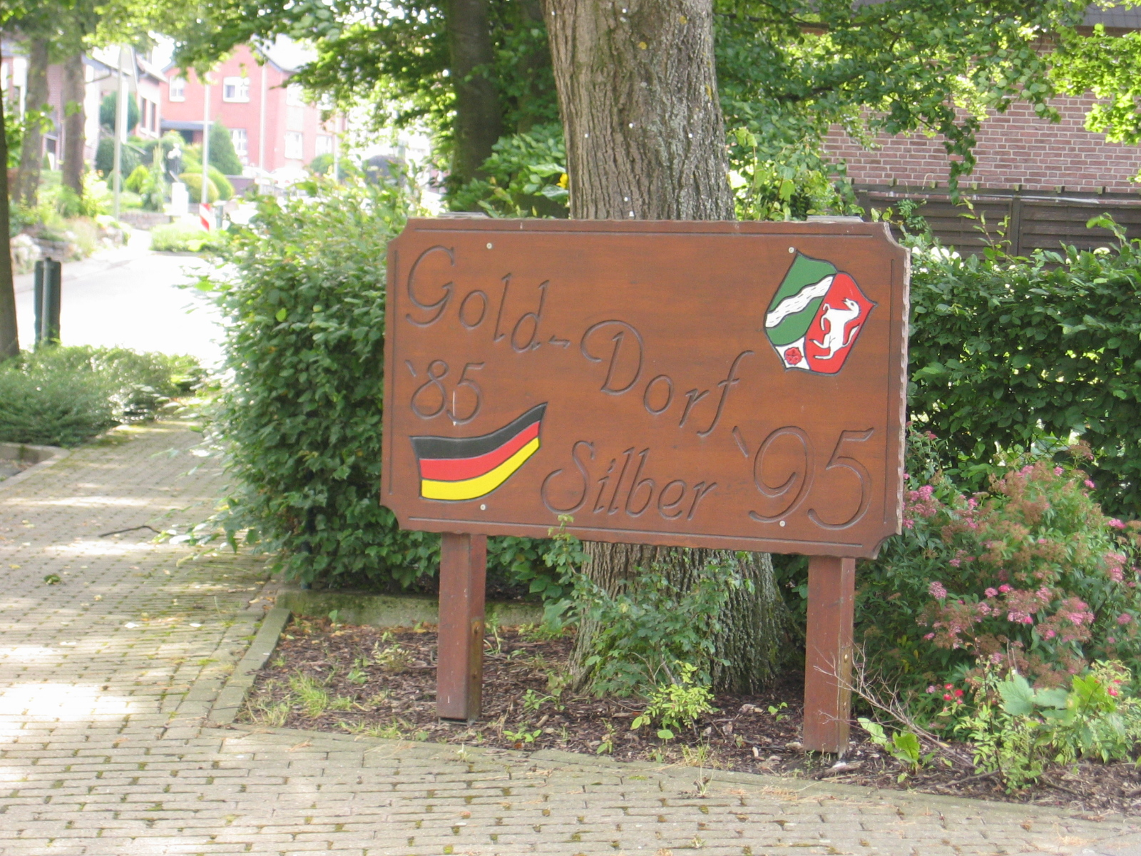 Ortseingang Beeck, 2012